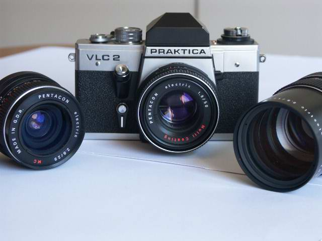 Kleinbild-Spiegelreflex-System Praktica VLC2 mit 3 Wechselobjektiven fotografiert von Benutzer:Runghold public domain